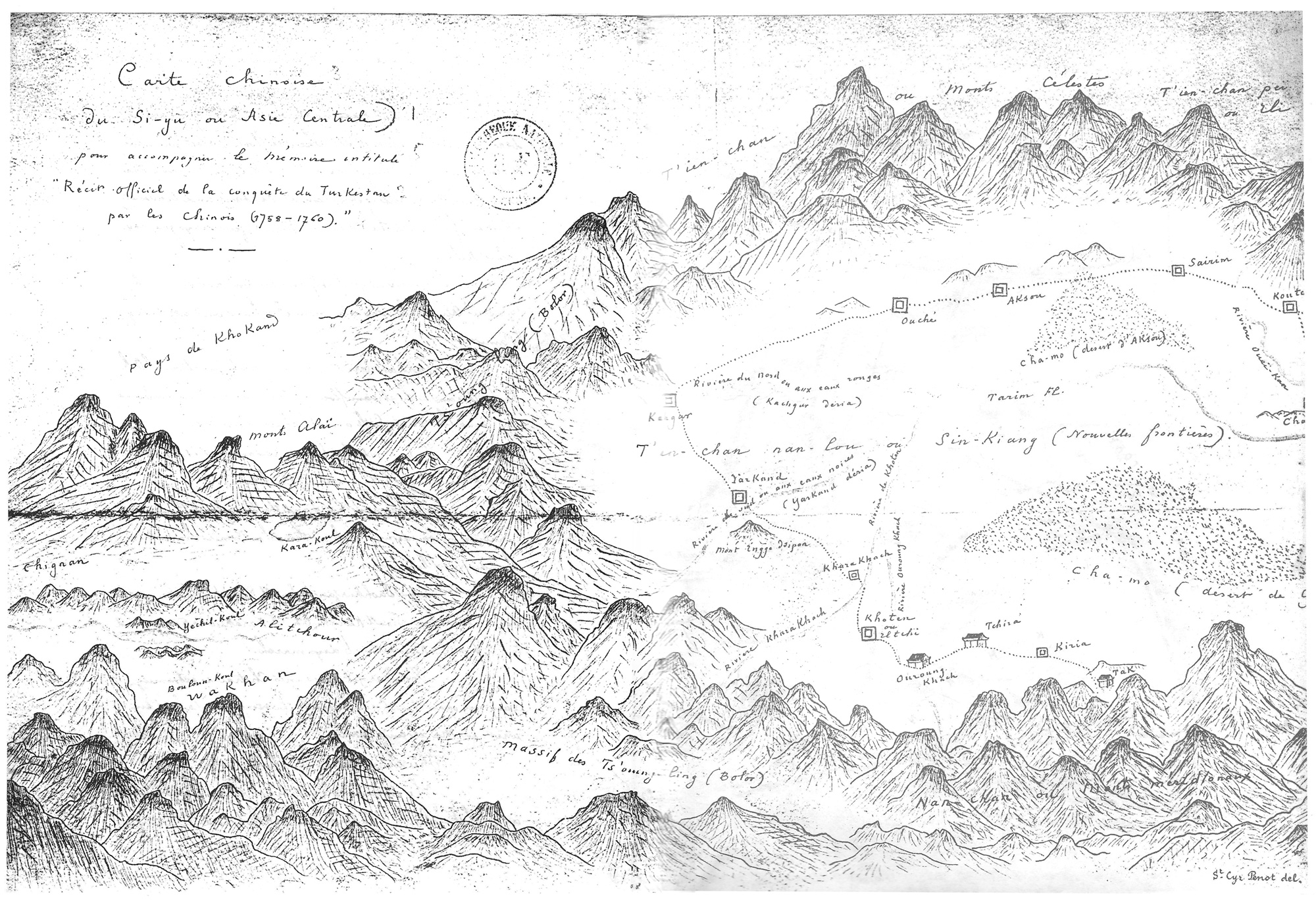 Французская копия карты Памира, составленной по результатам съёмок иезуитов Феликса да Роша и Педро Эспинья